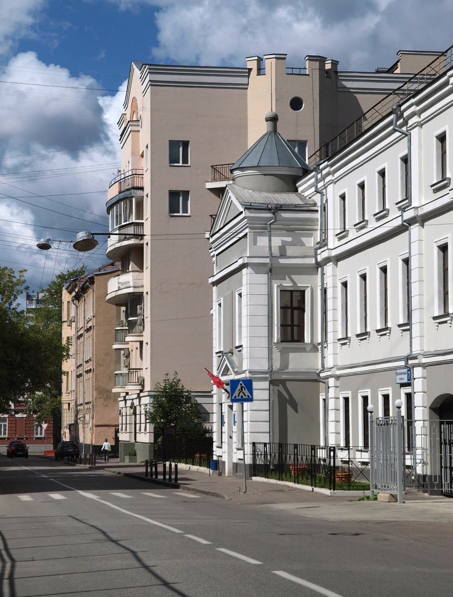 Bolnichny Lane, Moscow